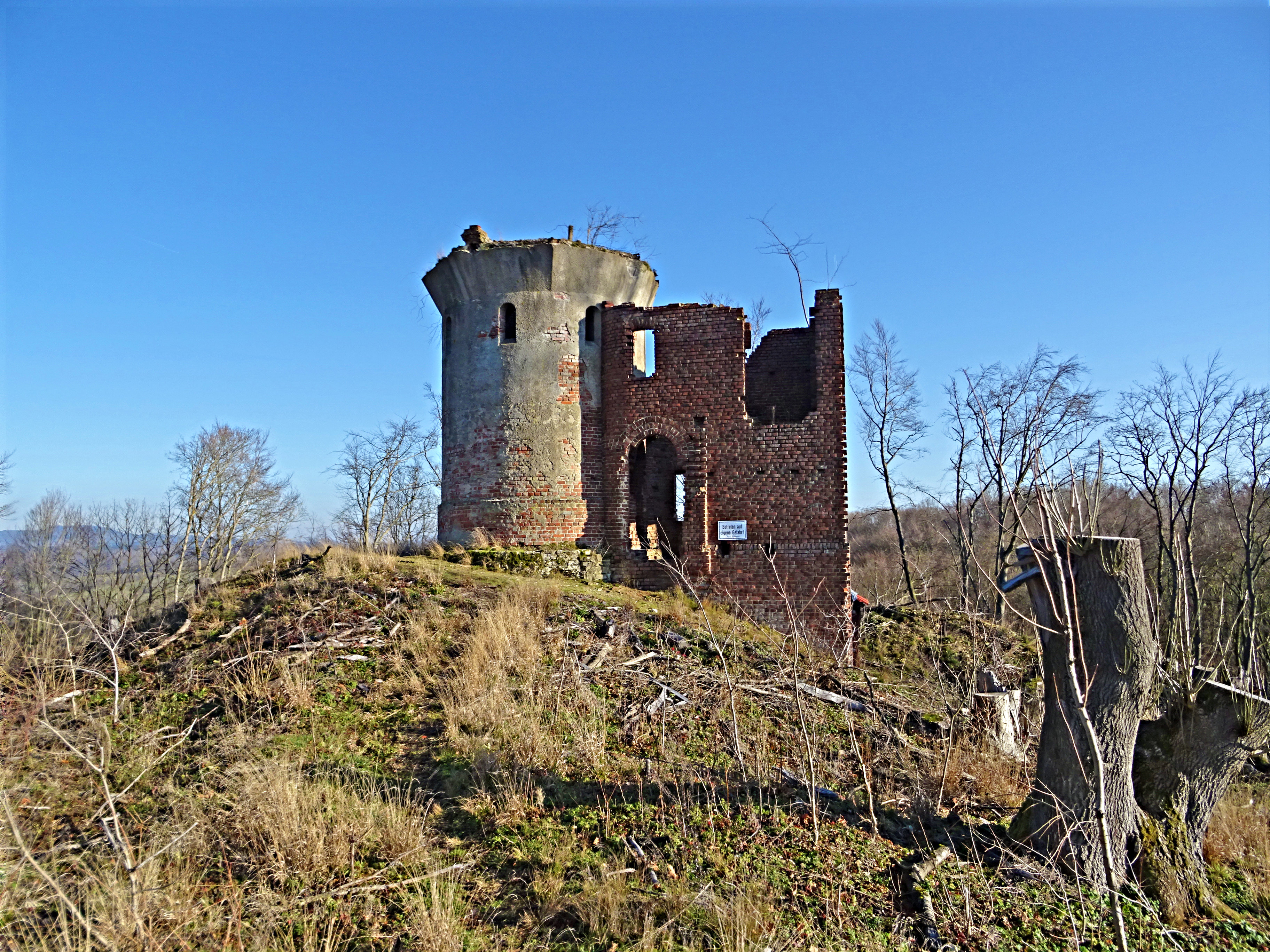 Burgruine Allerburg auf dem Allerberg bei Bockelnhagen (Eichsfeld) von Westen